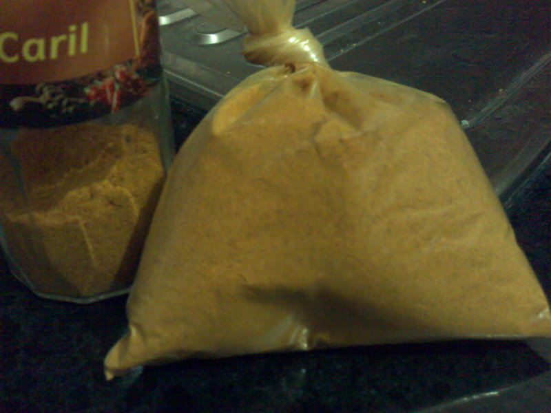 Pacote com pó de caril. Curry powder package.